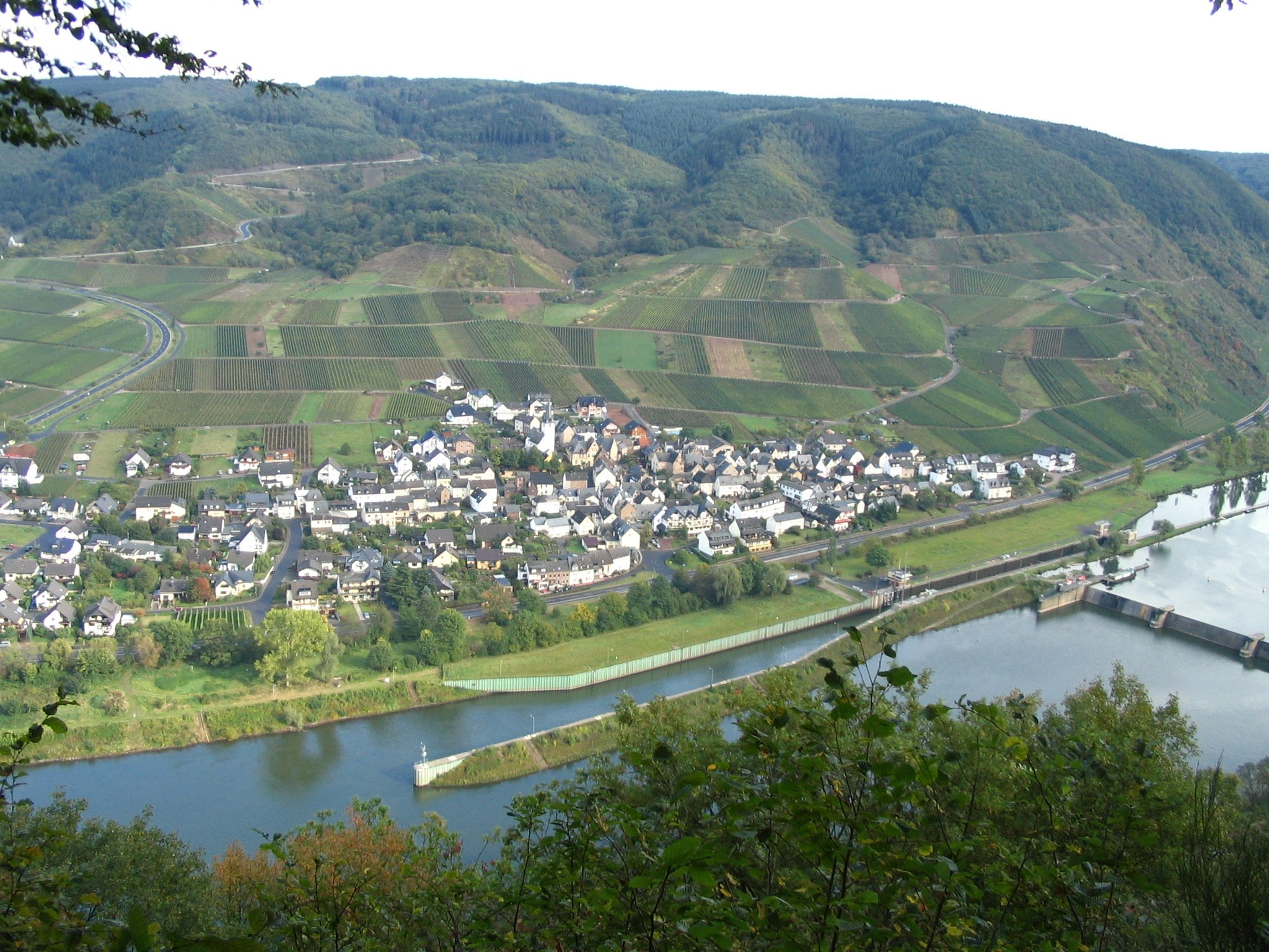 Moselschleuse in Bruttig-Fankel vor dem Bau der zweiten Kammer